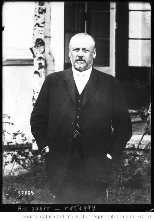 Mijaíl Rodzianko, presidente de la Duma Imperial rusa, en 1914.